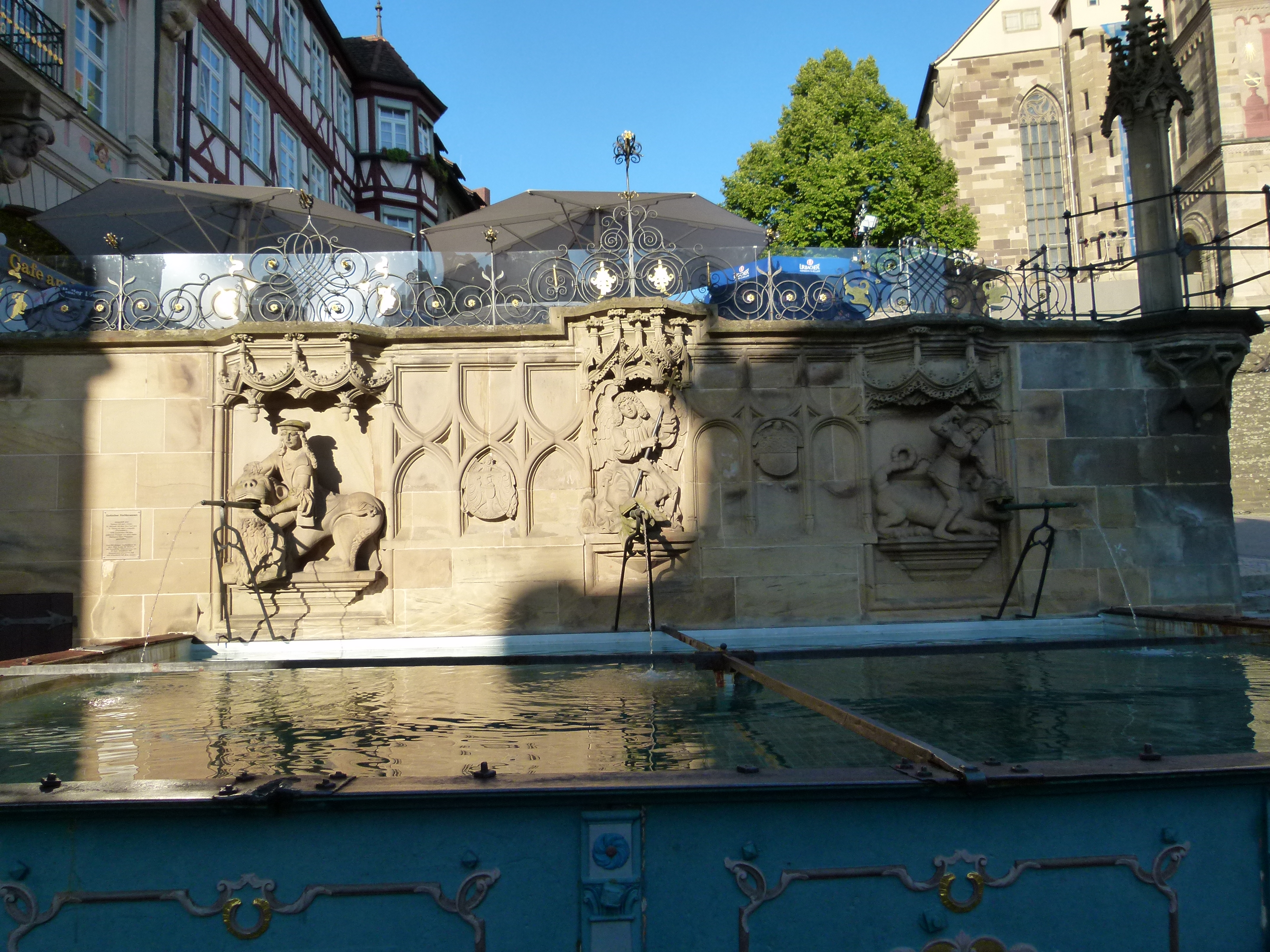 Marktplatzbrunnen Schwäbisch Hall